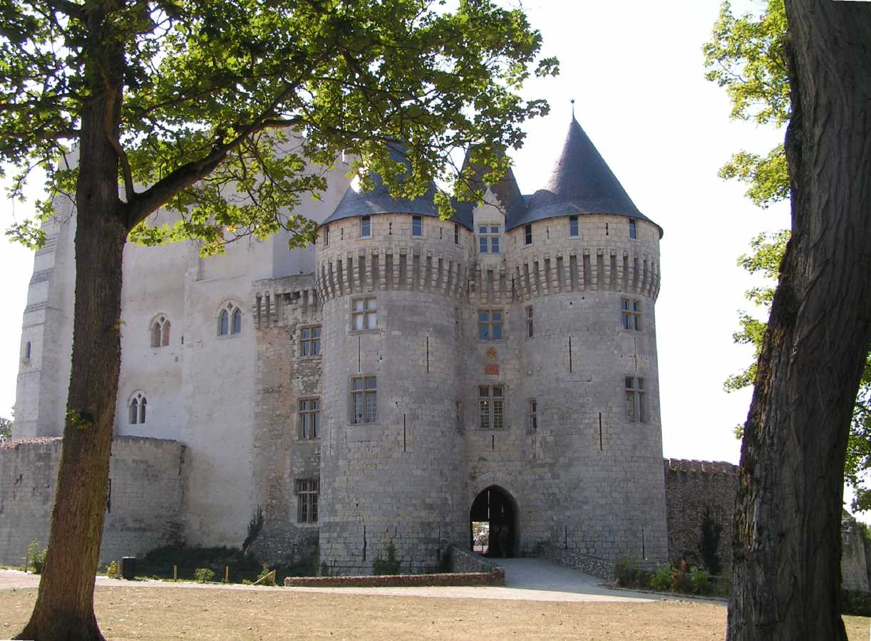 le château Saint-Jean à Nogent-le-Rotrou, Eure-et-Loir (France). Photo : Roby 07:45, 30 September 2005 (UTC)